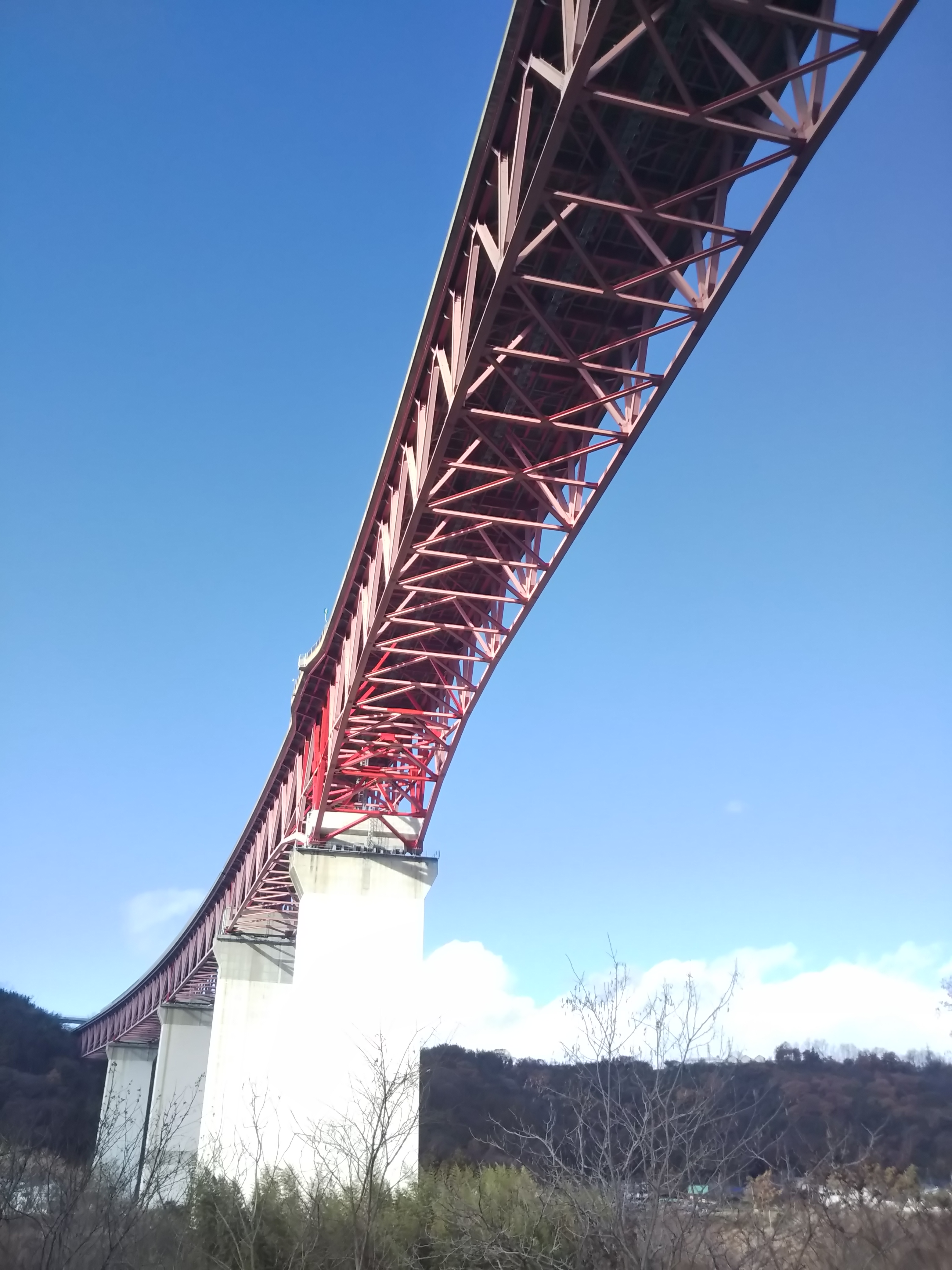 群馬県沼田市と昭和村の間の片品川に架かる、関越自動車道片品川橋